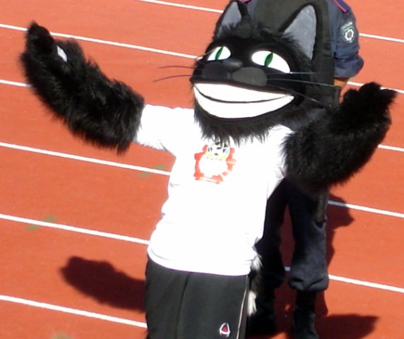 Талисман ФК Заря (Луганск)